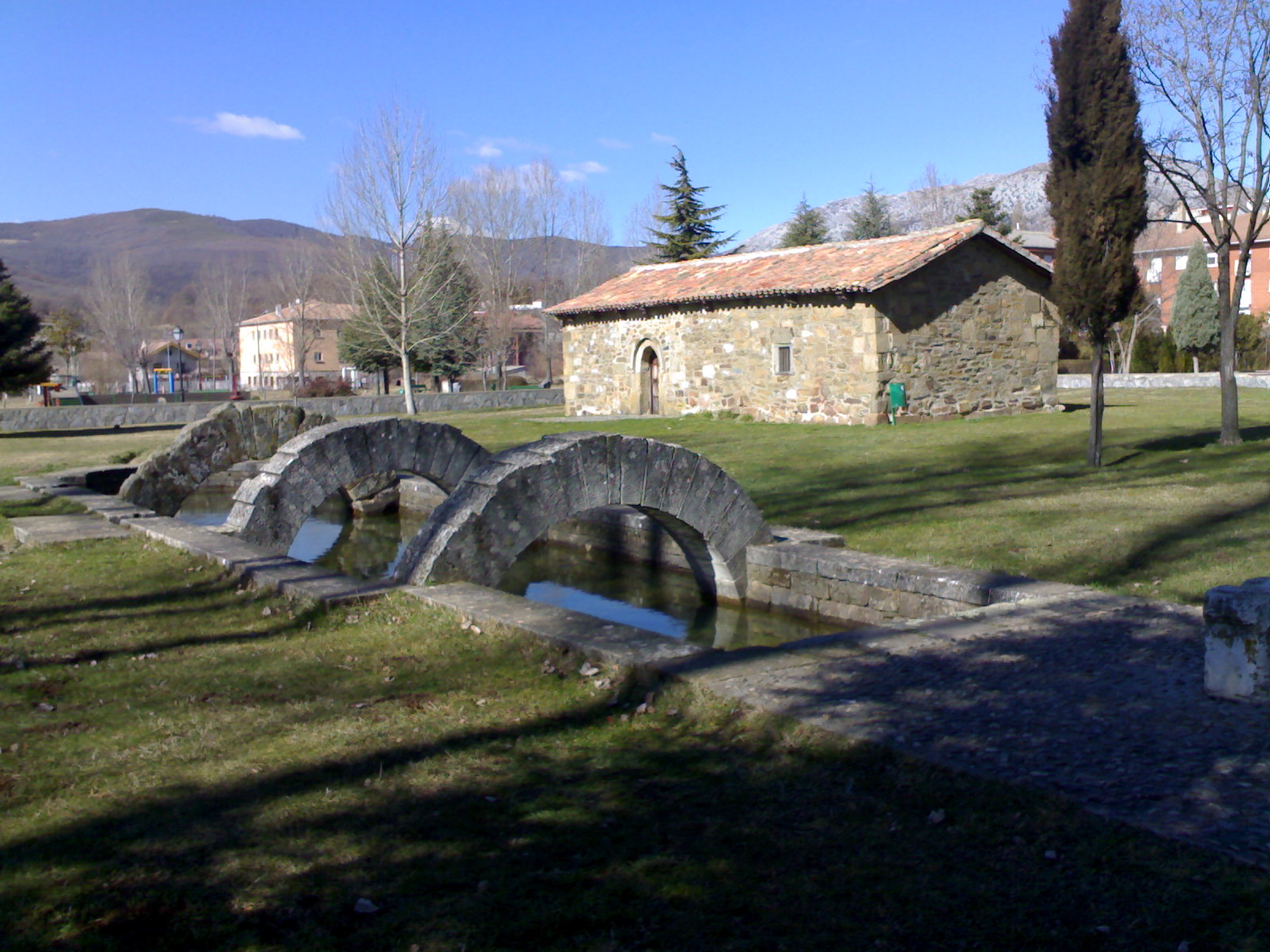 Fuente de La Reana, o Fuentes Tamáricas, en Velilla del Río Carrión, norte de España.